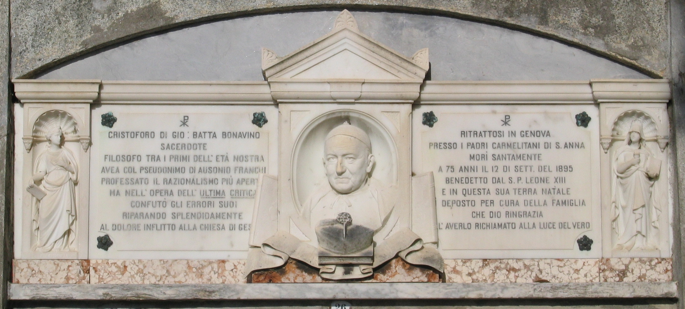 Cristoforo Bonavino's gravestone in Pegli cemetery